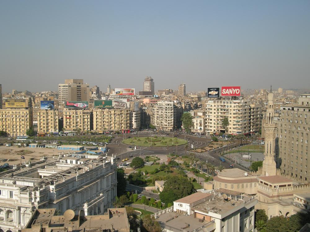 El Cairo